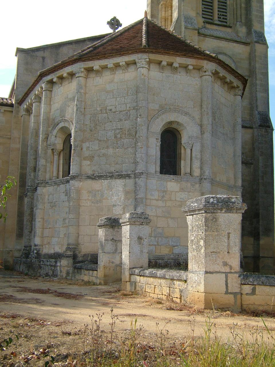 Lansac, Gironde (France); abside romane, départ du clocher XIXème siècle.